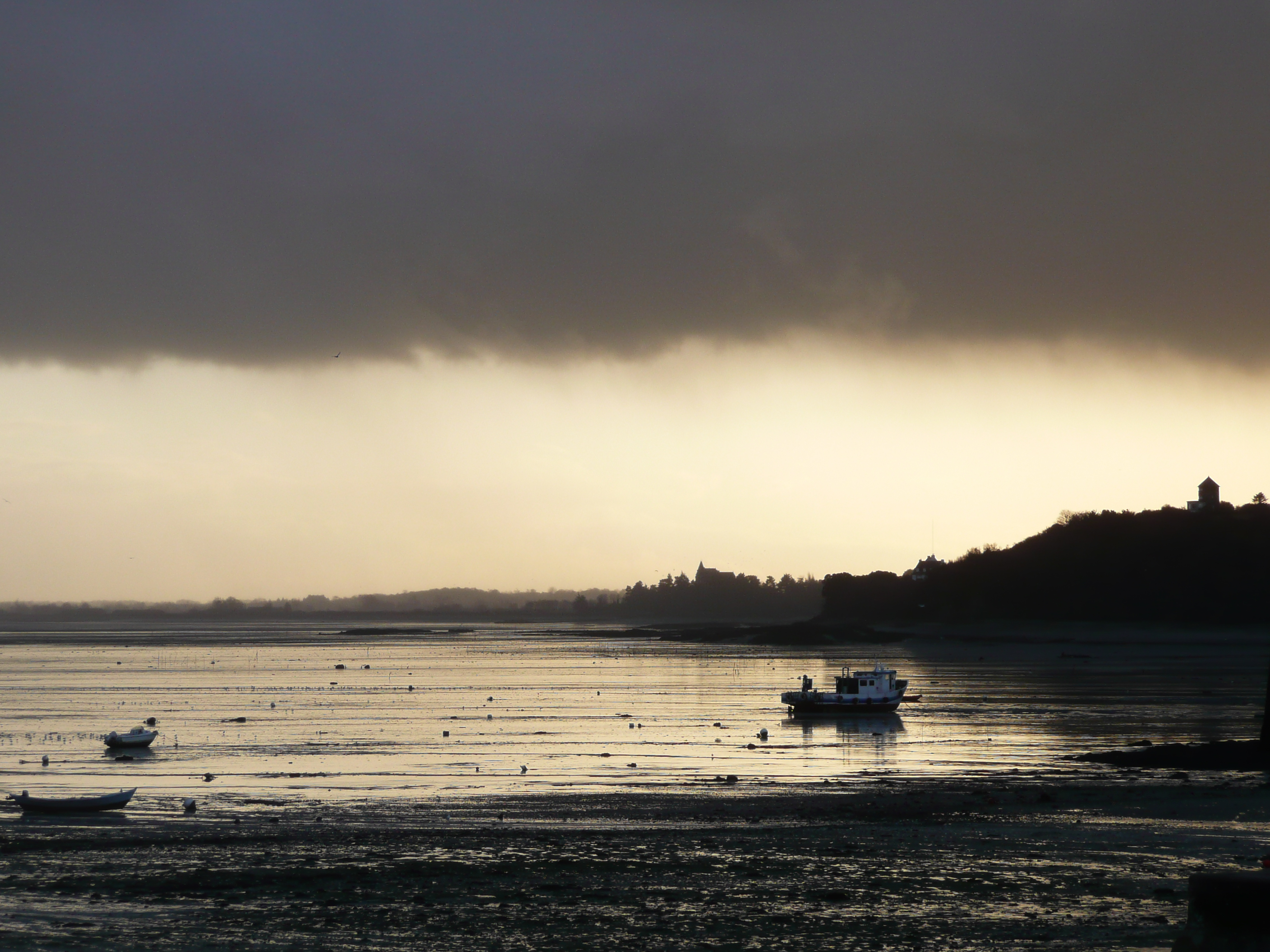 Cancale sous l'orage.